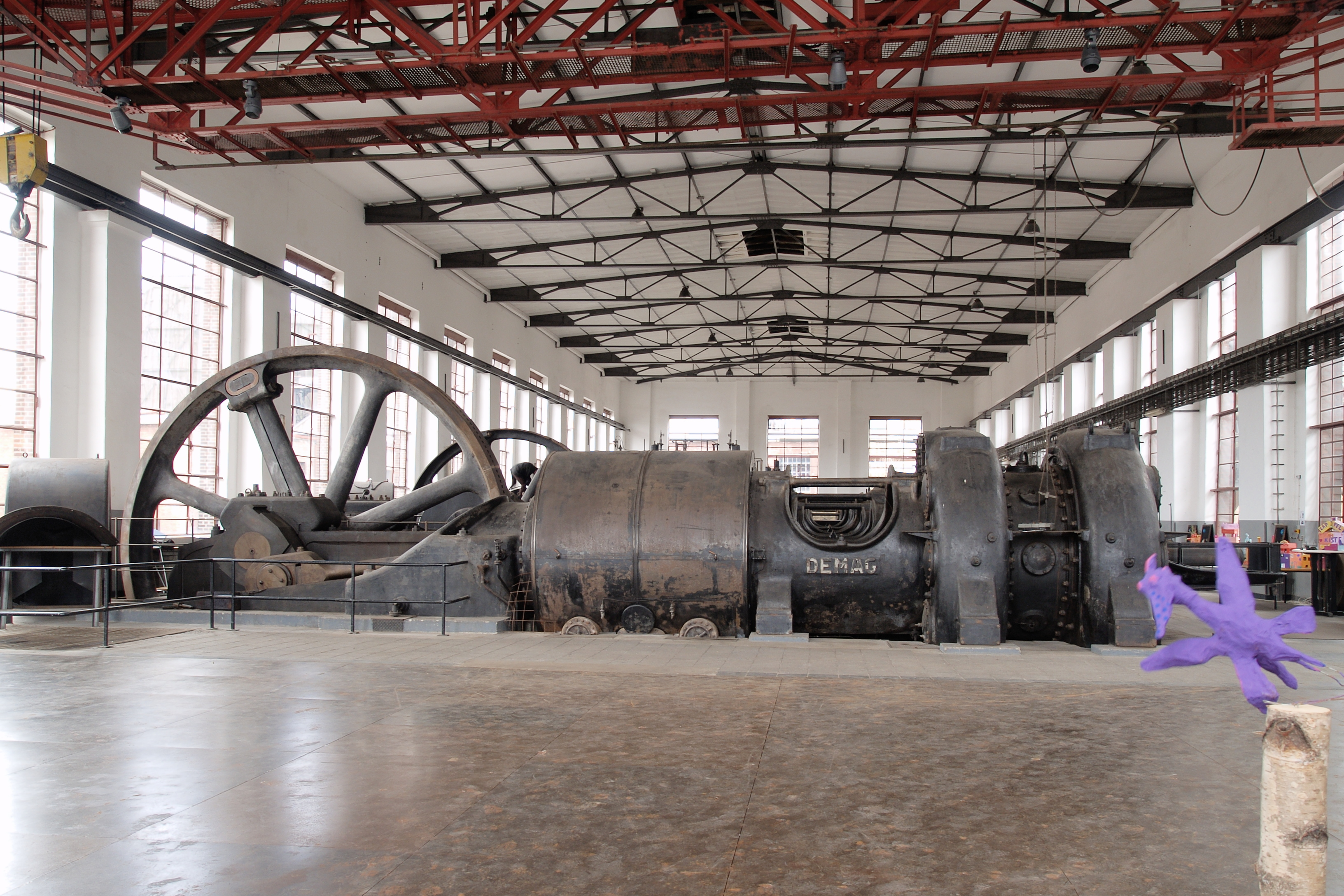 Die Kompressorenhalle in der stillgelegten Kokerei Hansa in Dortmund